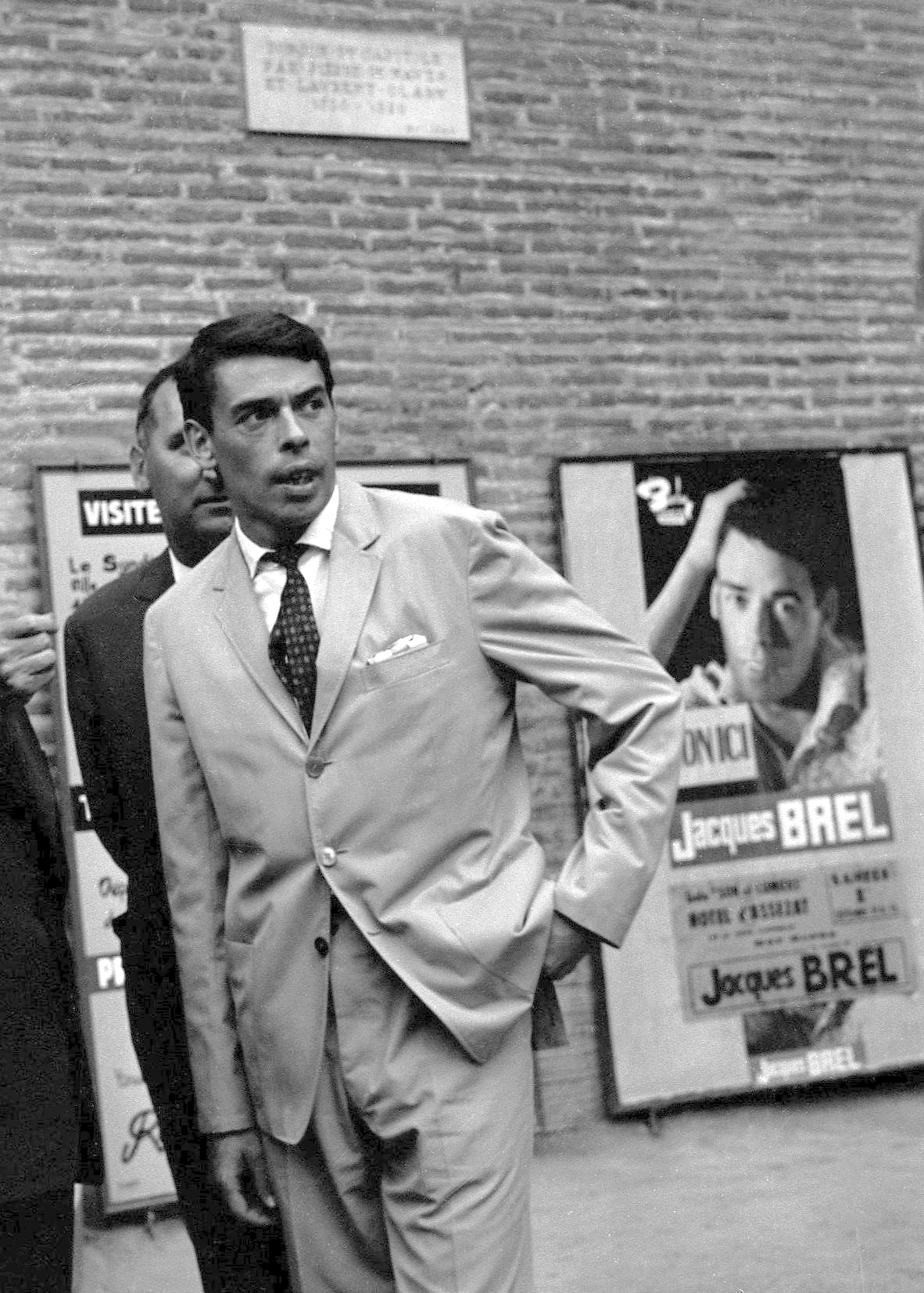 Donjon du Capitole. 1er septembre 1962. PLan en buste de Jacques Brel, chanteur français, discutant à l'intérieur du Donjon.